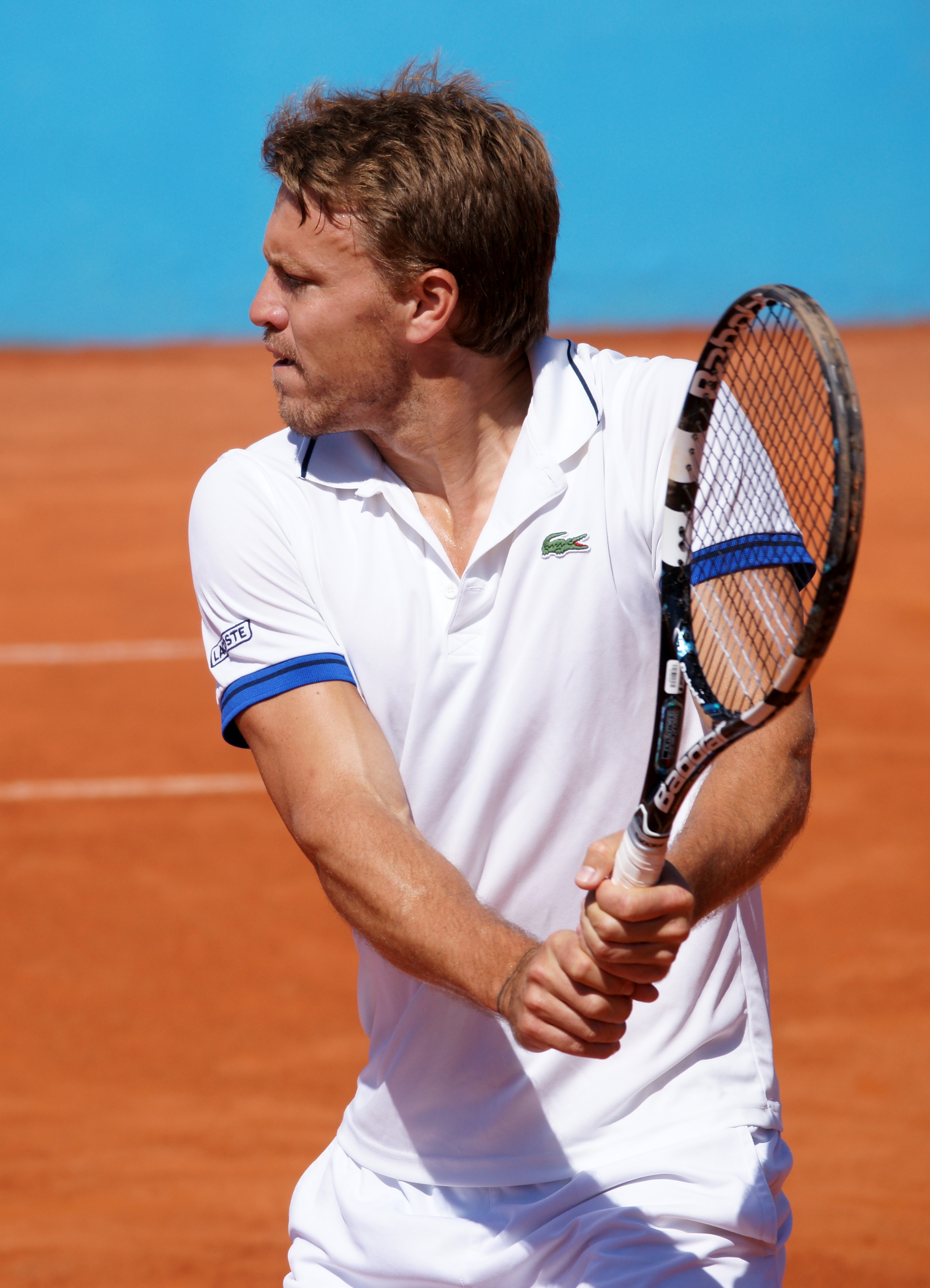 Benjamin Balleret Nice Open ATP 2014